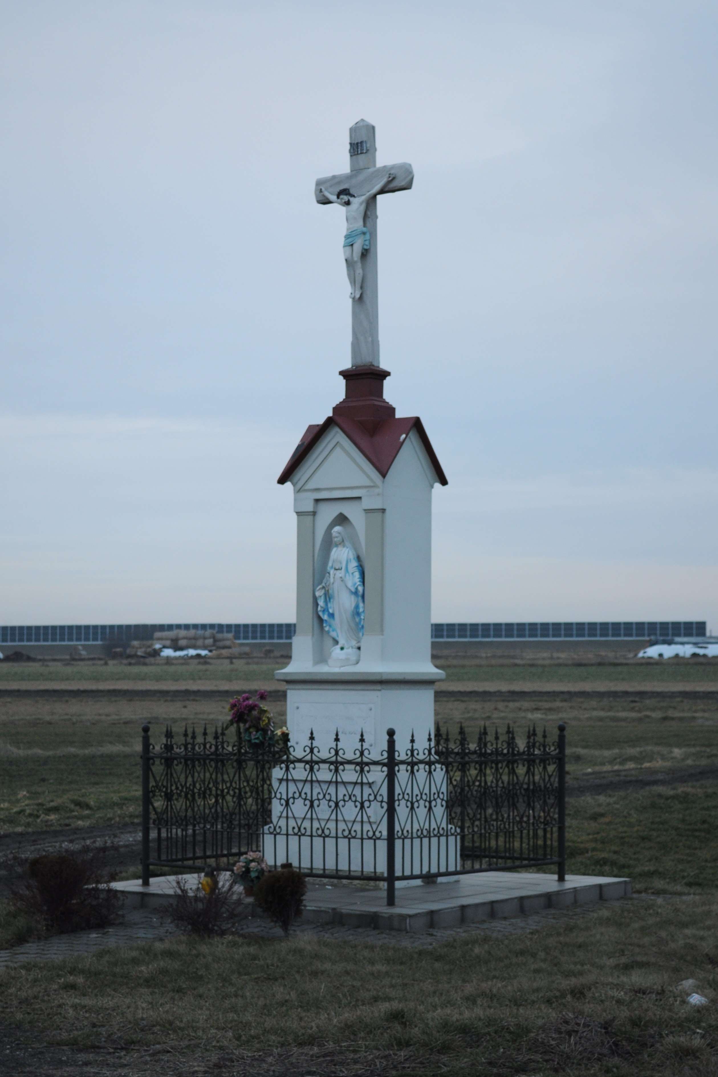 Świętoszowice. Krzyż przydrożny.